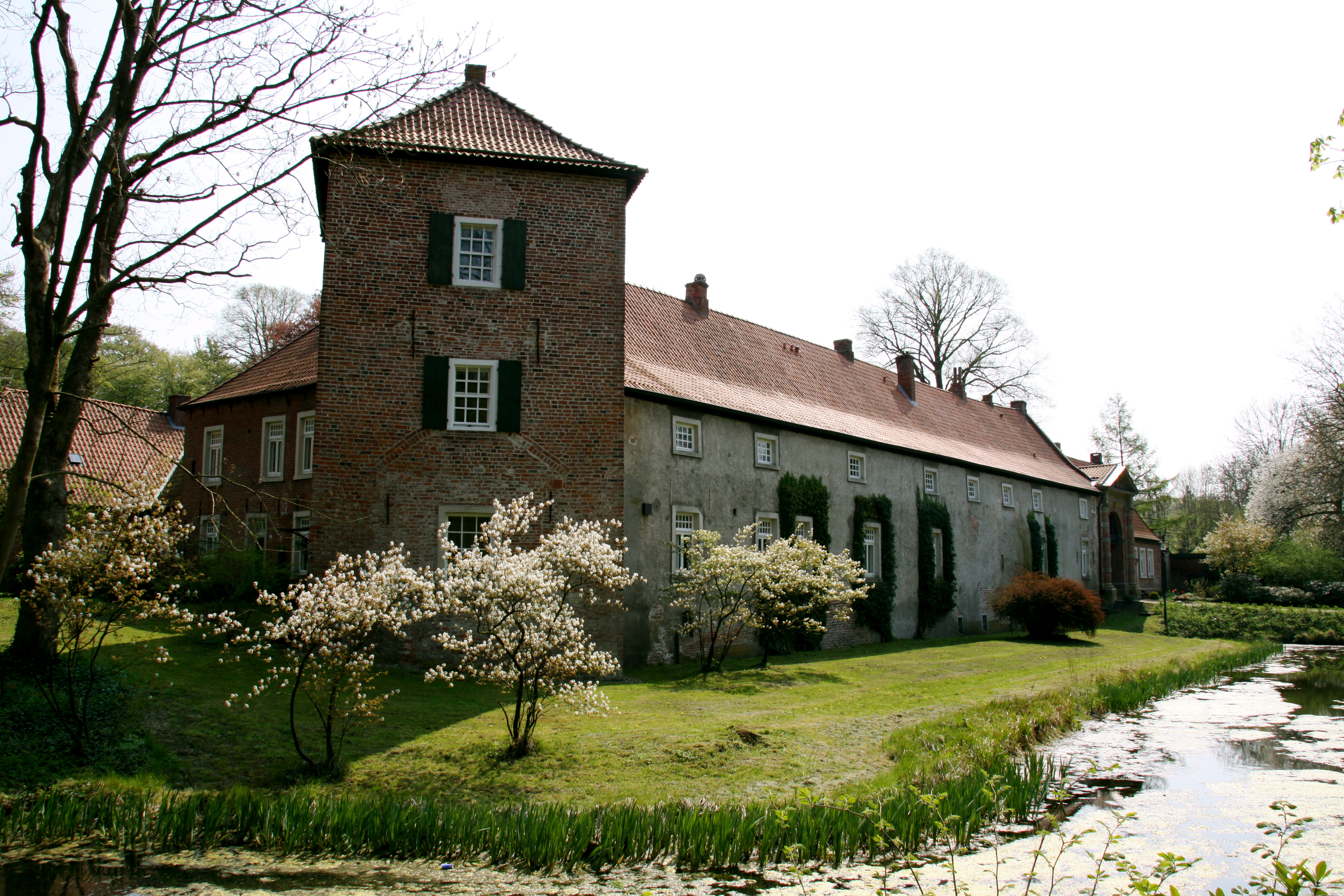 Burg Berum Vorburg